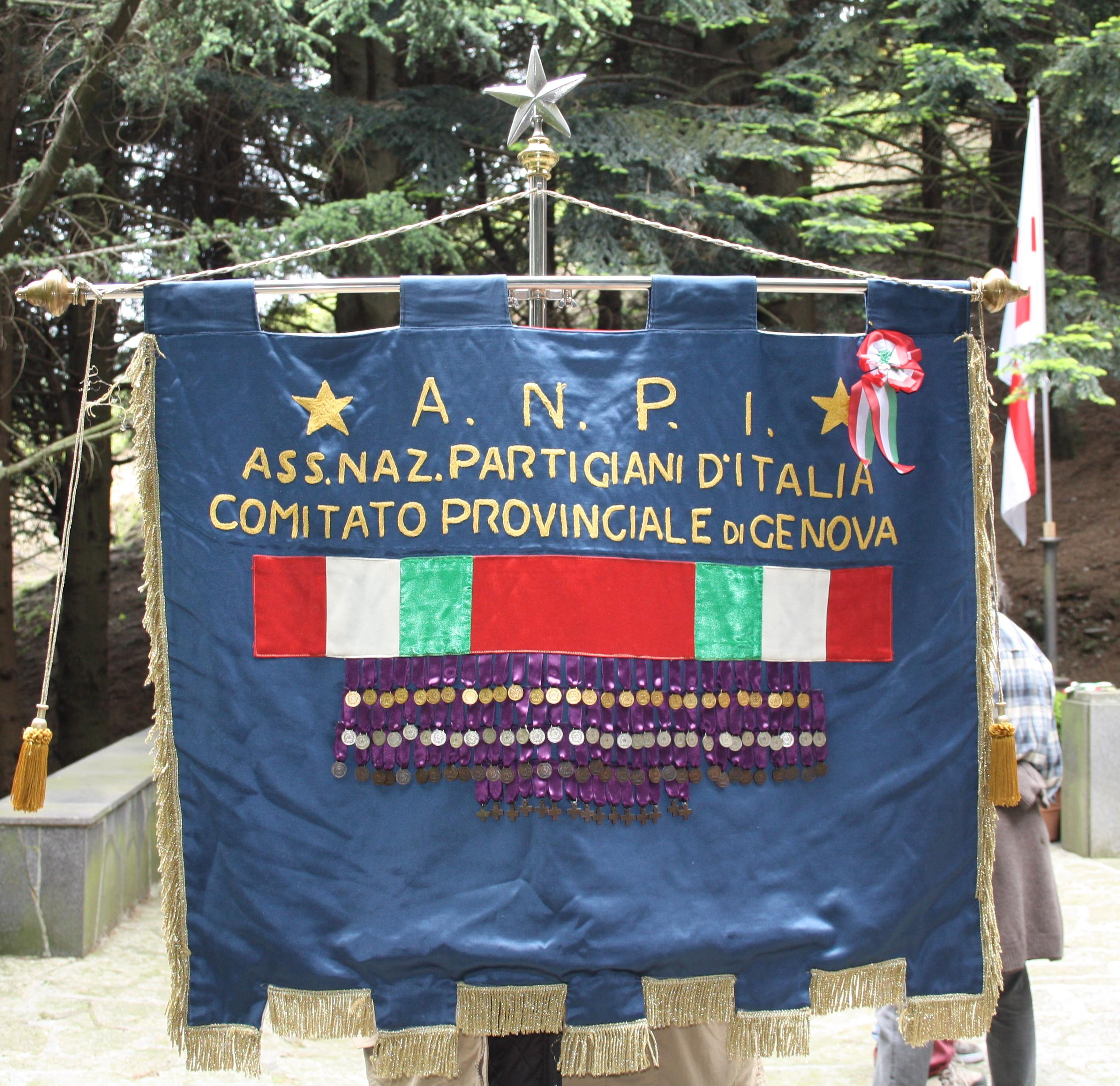 Il labaro dell'associazione provinciale di Genova dell'ANPI. Foto scattata al Sacrario dei Martiri del Turchino